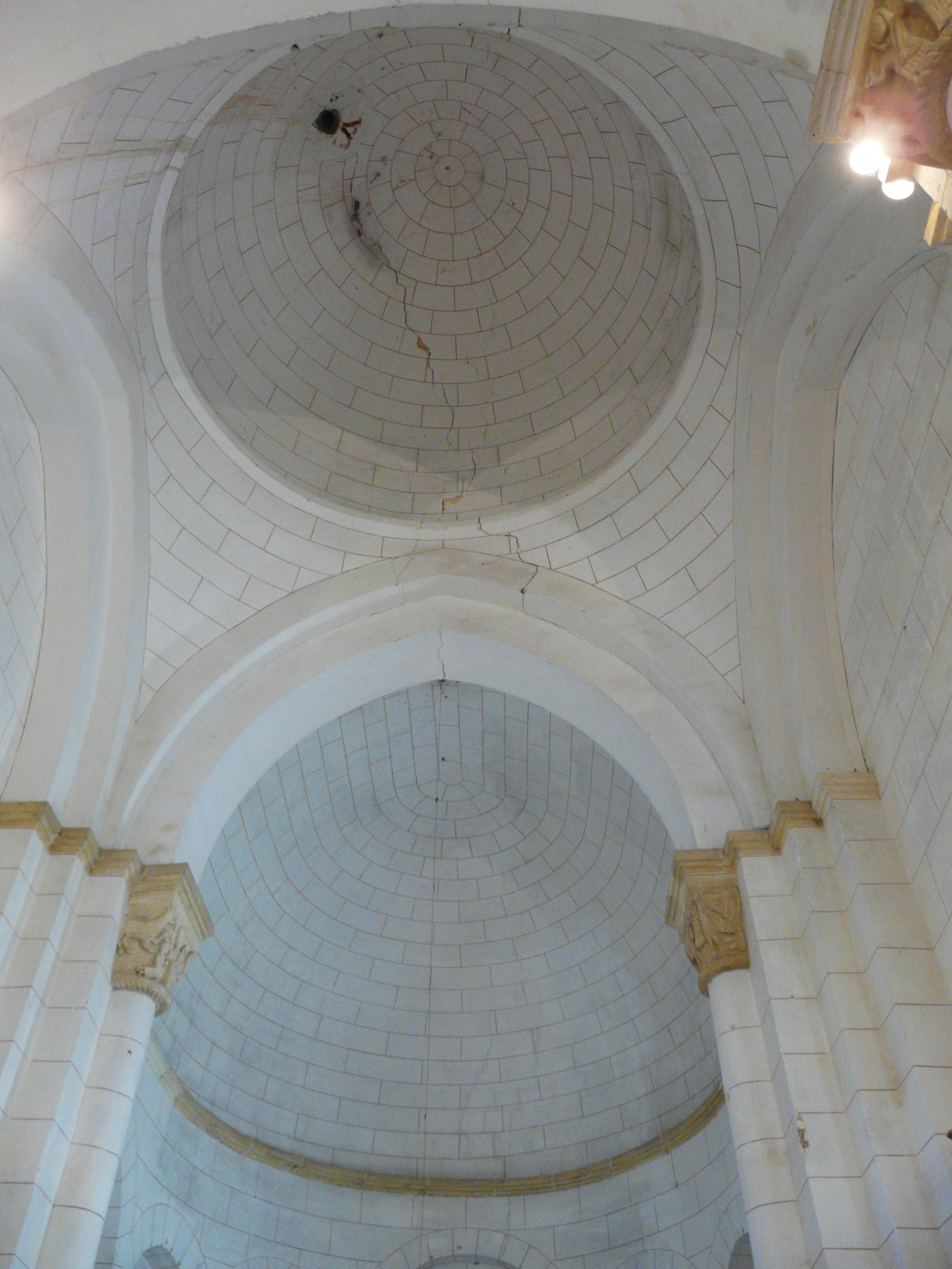 La coupole et le cul-de-four de l'abside, église Notre-Dame de l'Assomption de Cause, Cause-de-Clérans, Dordogne, France.